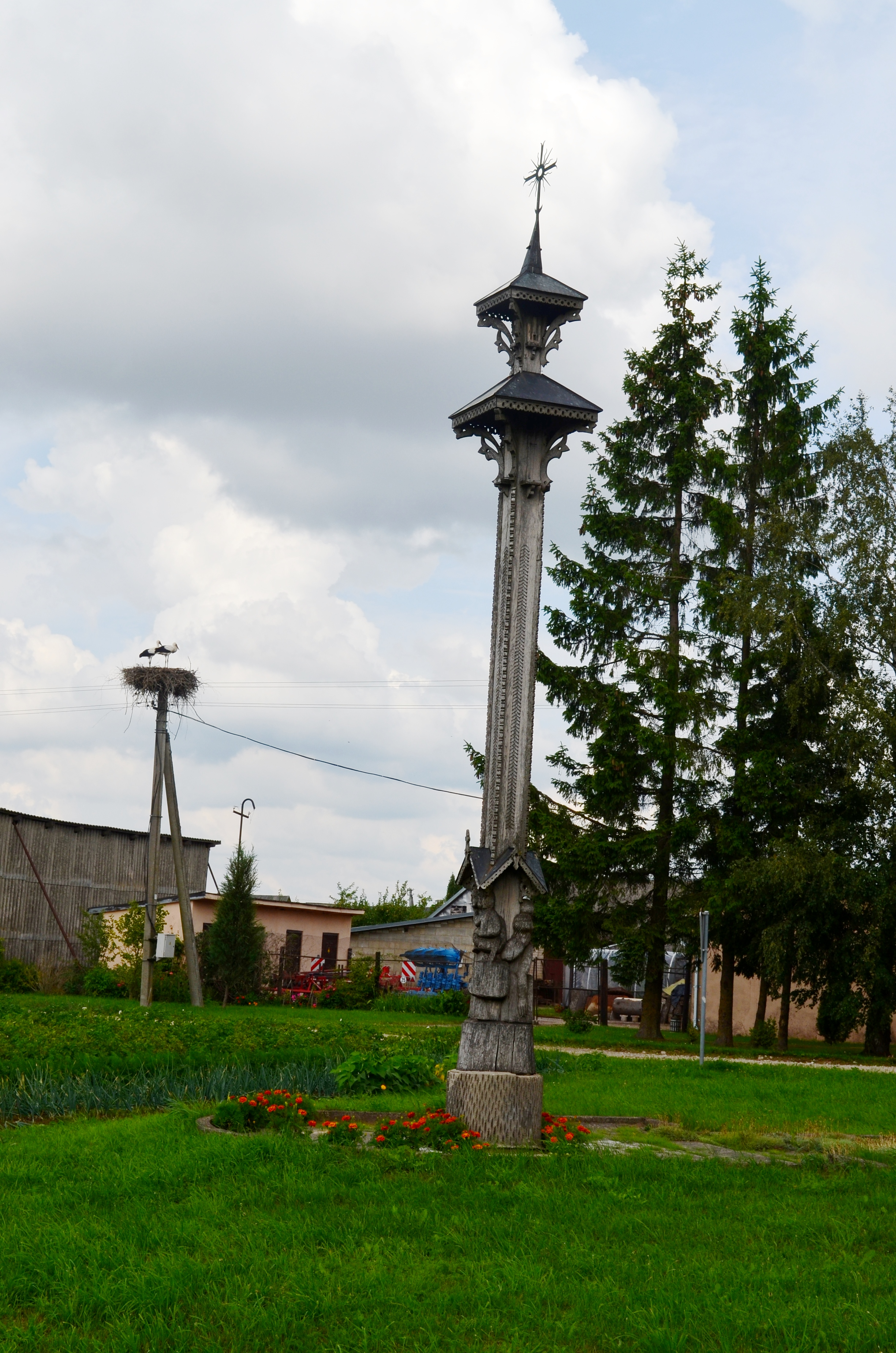 Žižmių k., Ramygalos sen., Panevėžio raj.